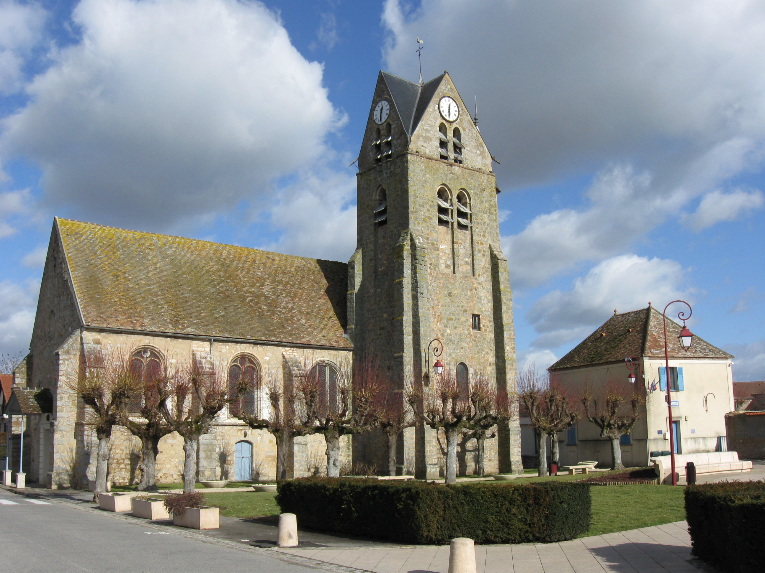 Marolles-sur-Seine, la mairie et l'église Saint-Germain